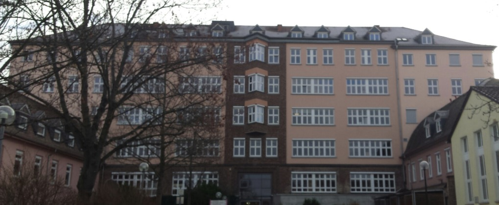 Gebäude Paulinum Stiftung kreuznacher diakonie. Architekt Willibald Hamburger